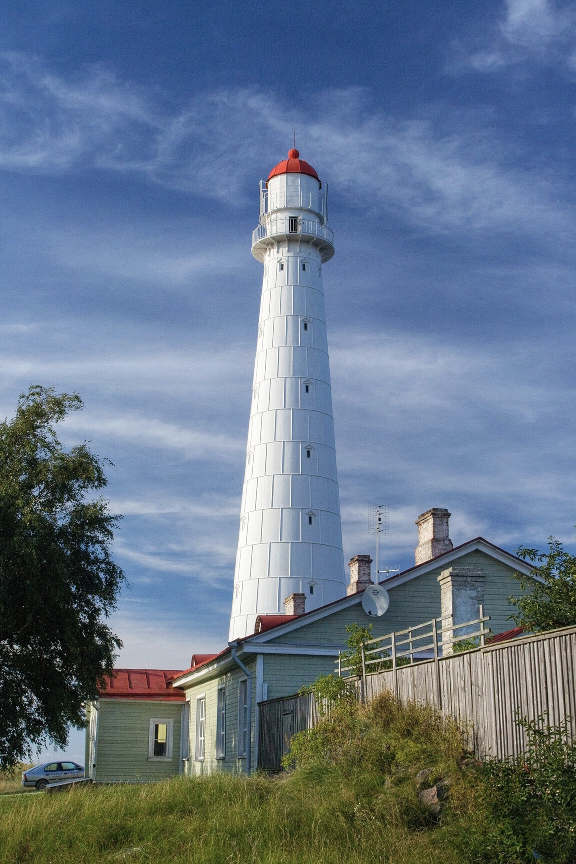 Tahkuna tuletorn